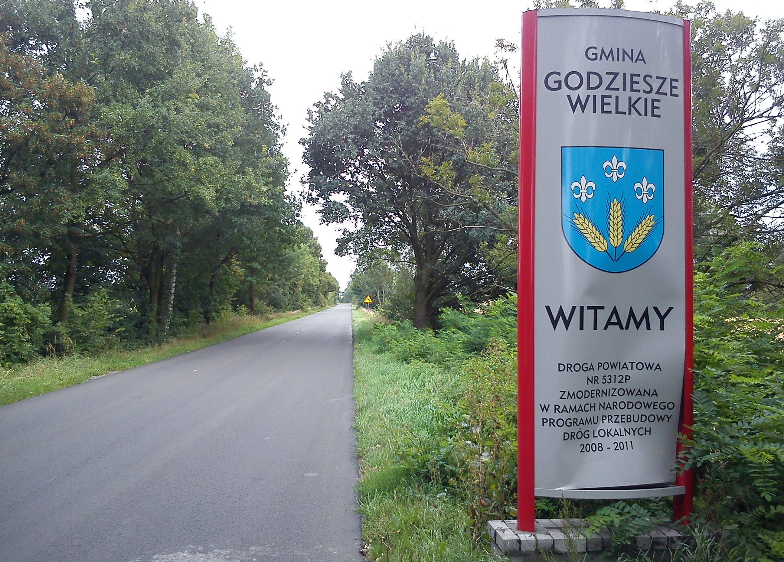 Szosa powiatowa 5312 w Ołoboku.